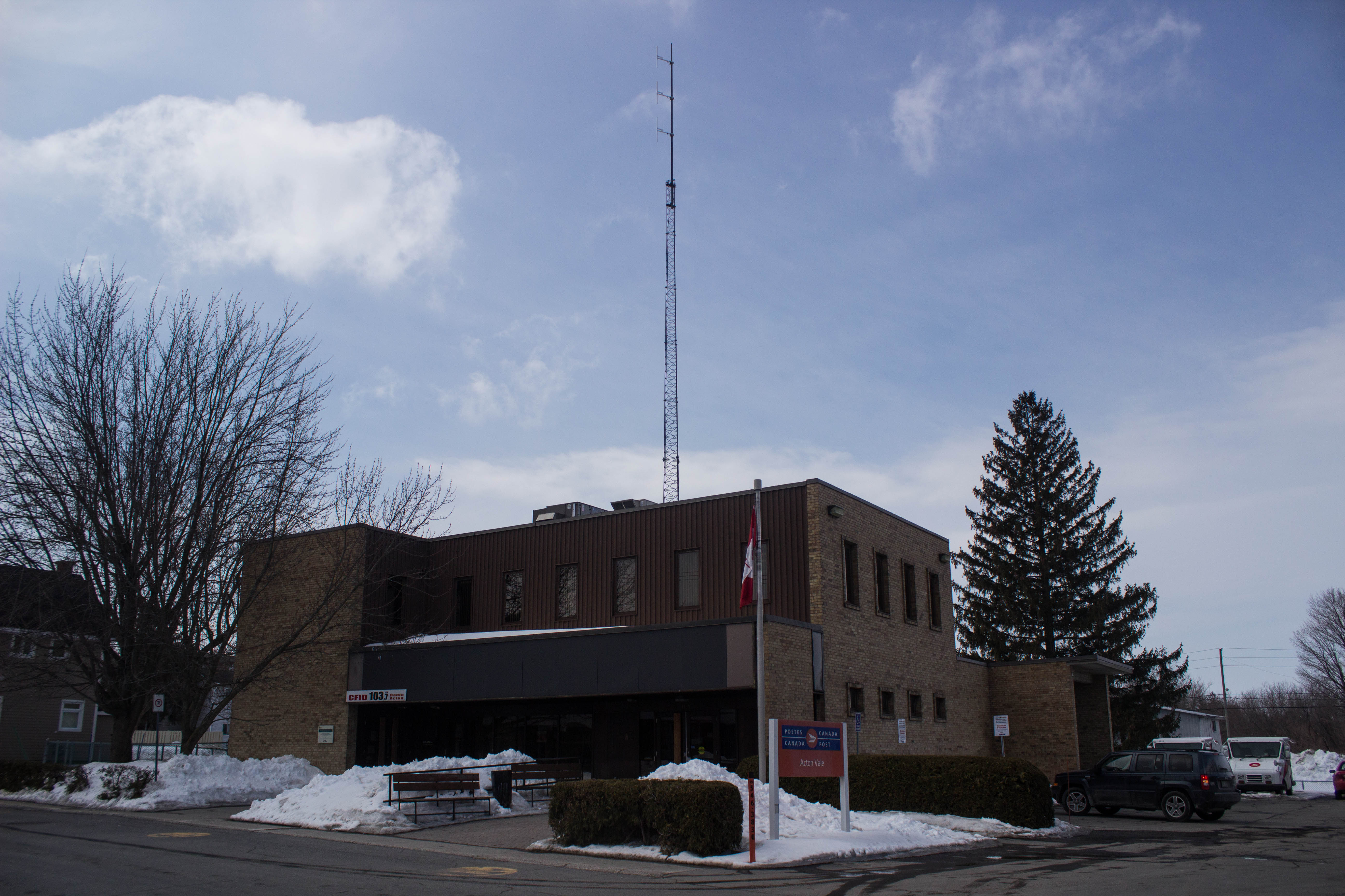 Édifice abritant Postes Canada et la radio CFID 103,7 à Acton Vale